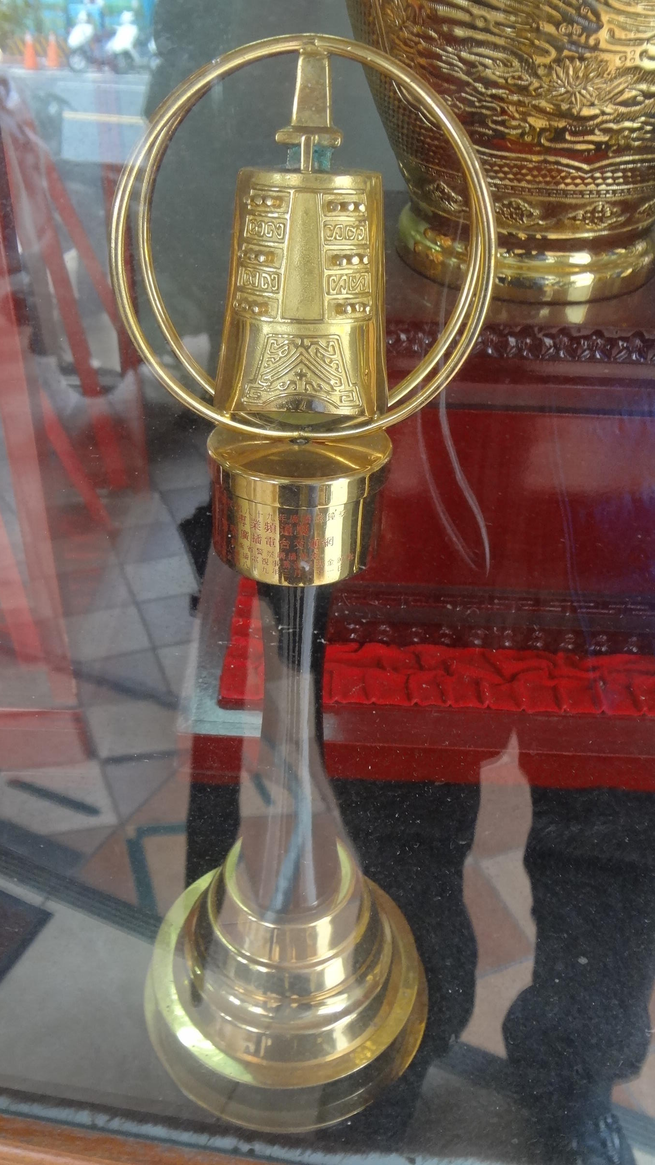 2000年廣播金鐘獎，警察廣播電台交通網獲頒的專業頻道獎獎座。